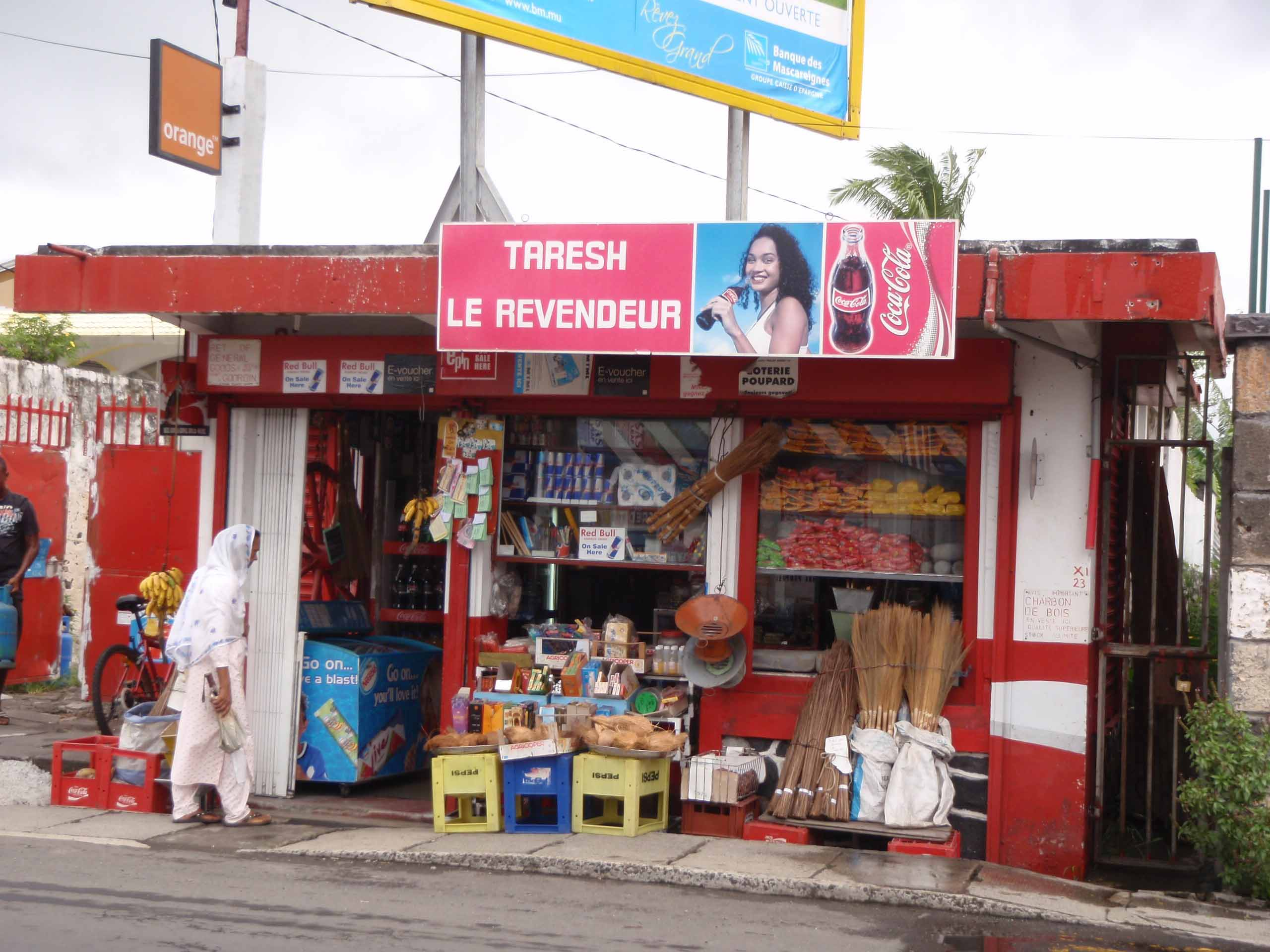 Mahébourg, petite boutique route Royale, île Maurice